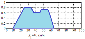 Рисунок 1